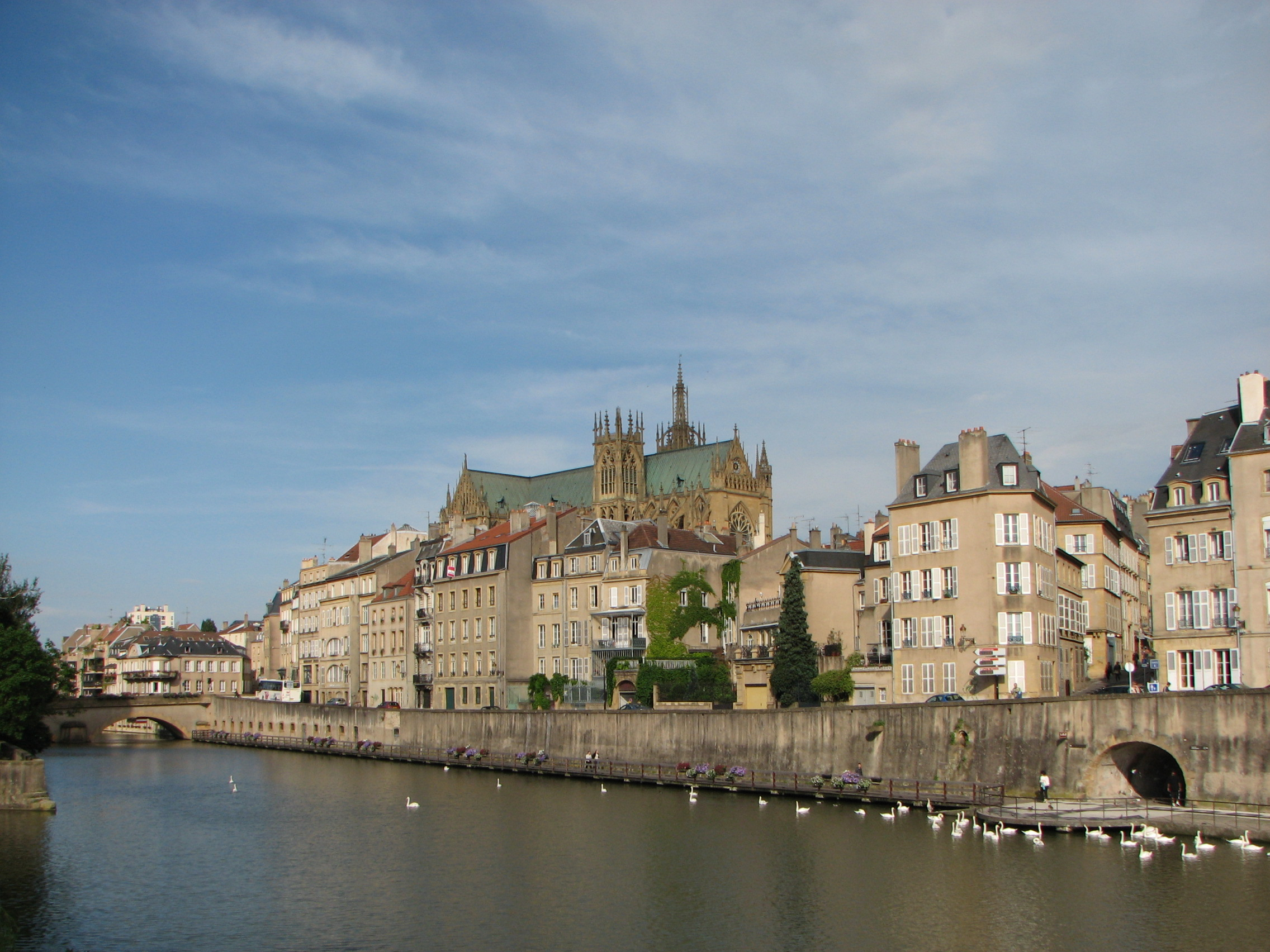 Vue sur les quais de la Moselle à Metz et la cathédrale Saint-Étienne